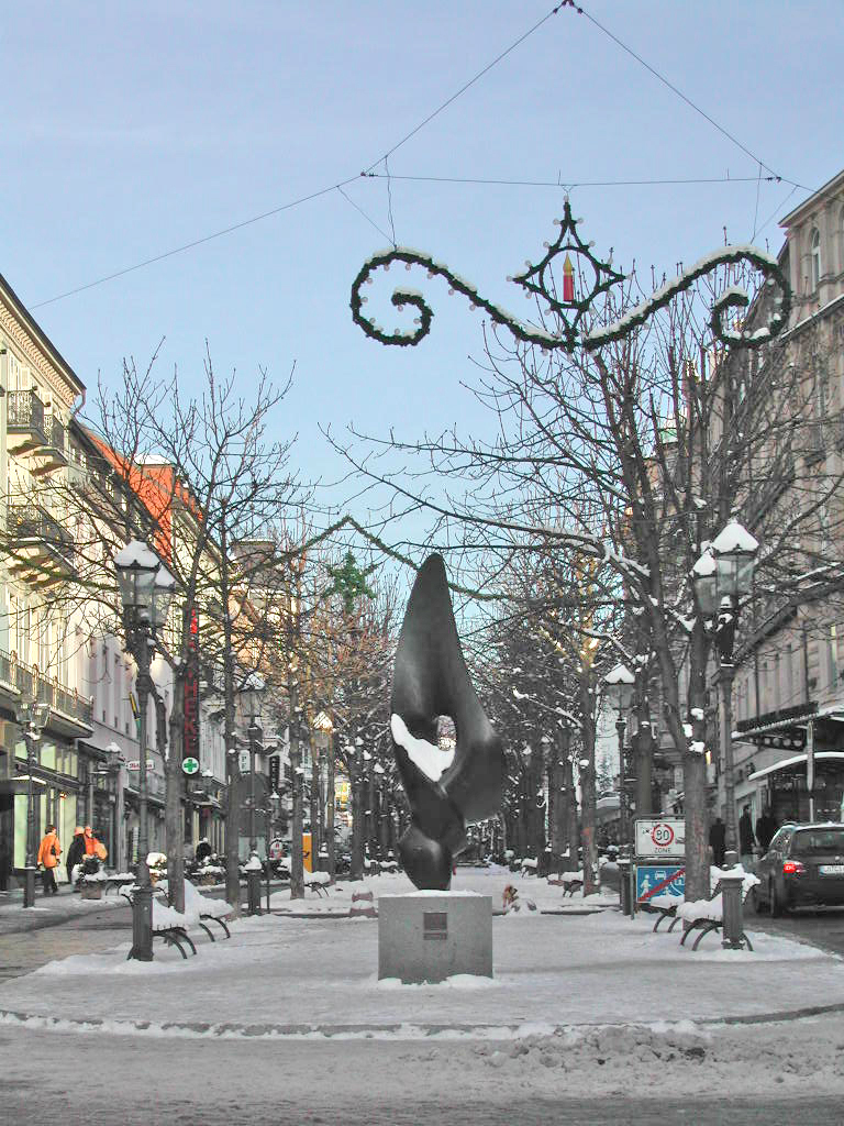 Geschäftsstrooss zu Baden-Baden